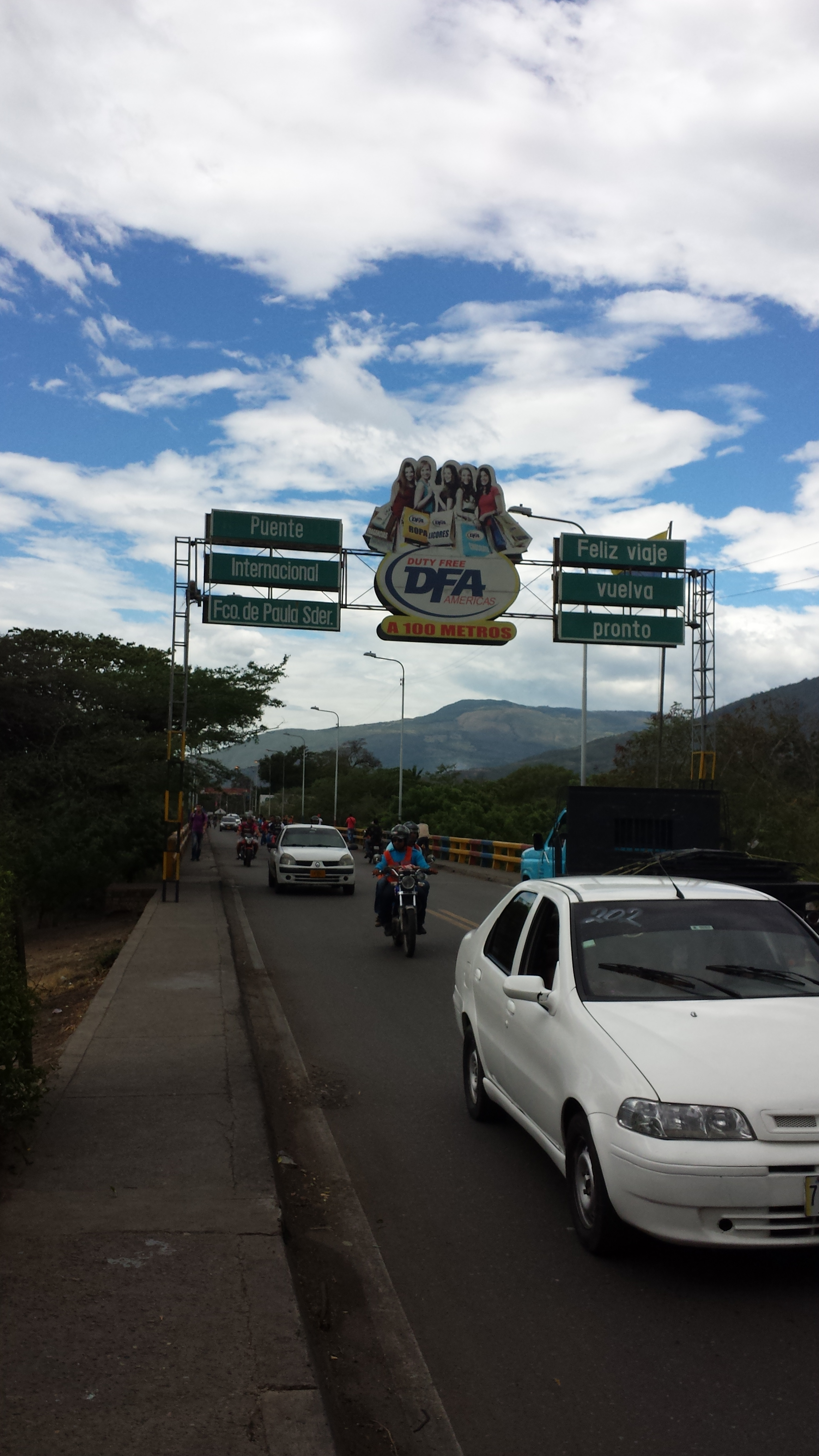 Municipio Pedro María Urena, Táchira, Venezuela.